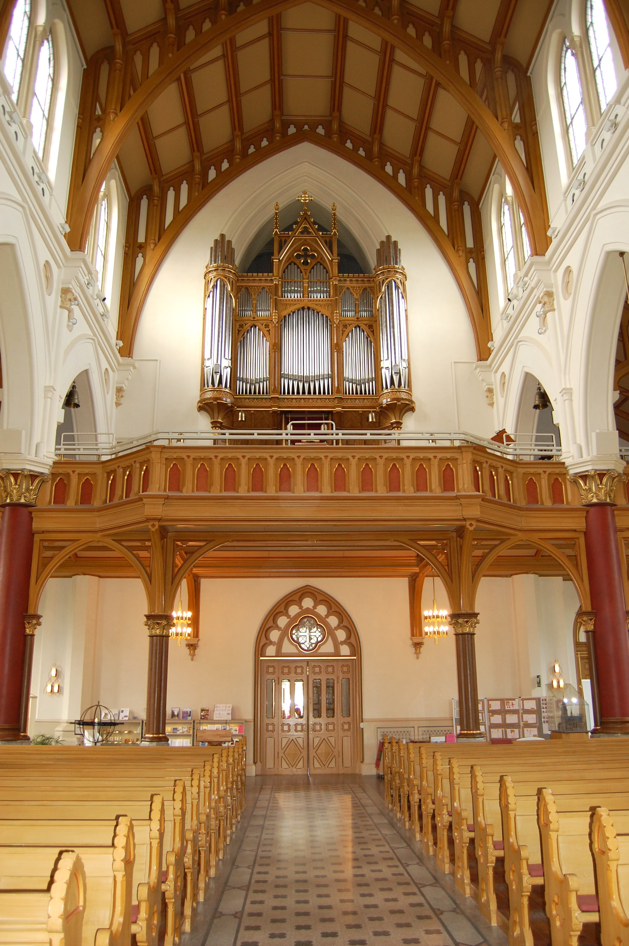 Blick auf die Orgel der Sofiakirche in Jönköping